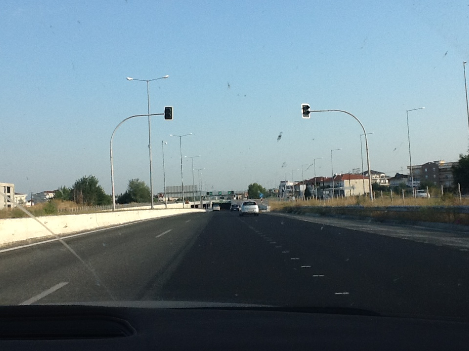 Σήραγγα Αλέξανδρος του Α1/Ε75, Αύγουστος 2013